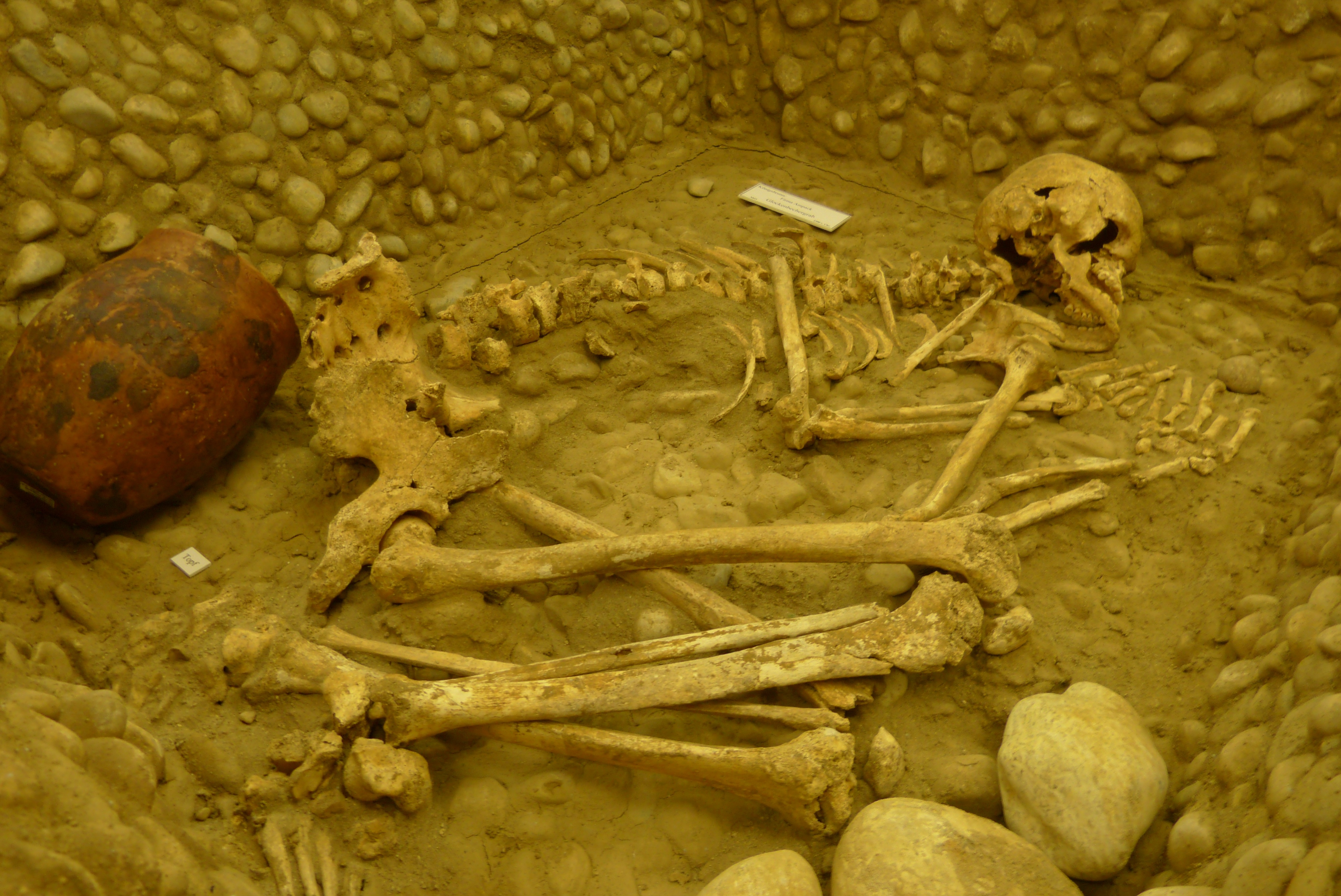 Archäologisches Museum Königsbrunn, "Glockenbechermann" (Hockergrab aus der Glockenbecherkultur).